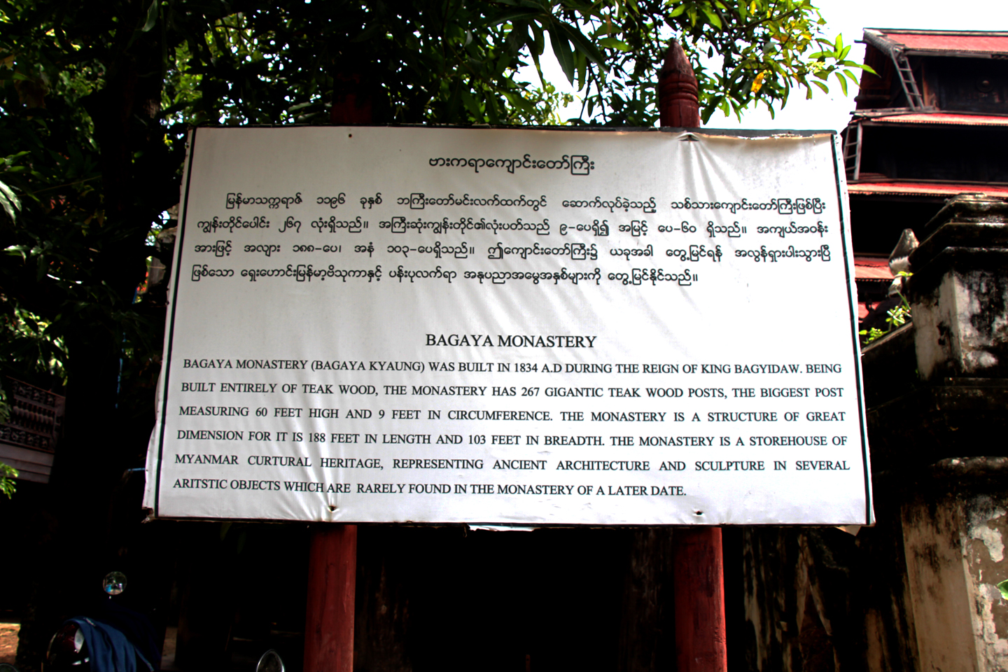 မြန်မာဘာသာ: ဗားကရာ ဘုန်းကြီးကျောင်း (အင်းဝ)